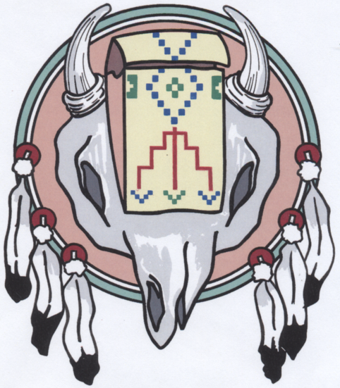 Air Refueling Squadron Emblem